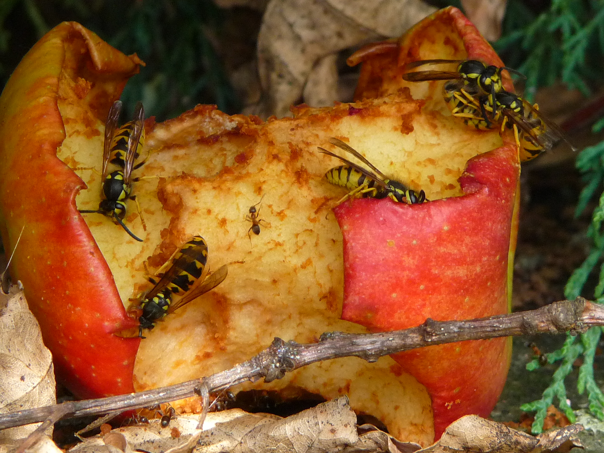 Angebissener Apfel, der von Wespen und Ameisen als Nahrungsquelle genutzt wird